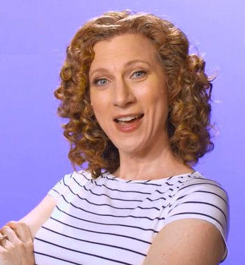 Laurie Berkner